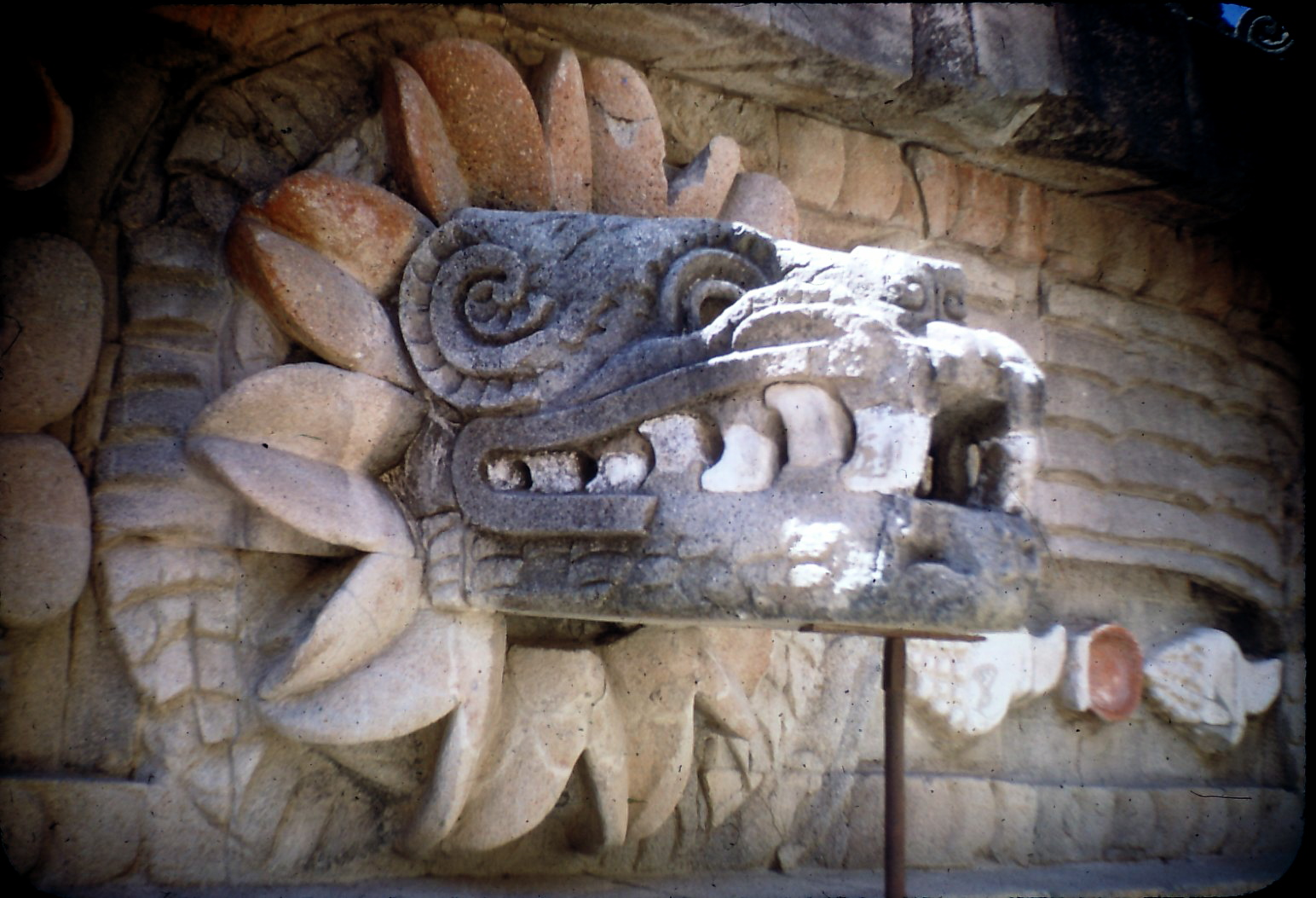 1948. Quetzalcoatl at Teotihuacan.